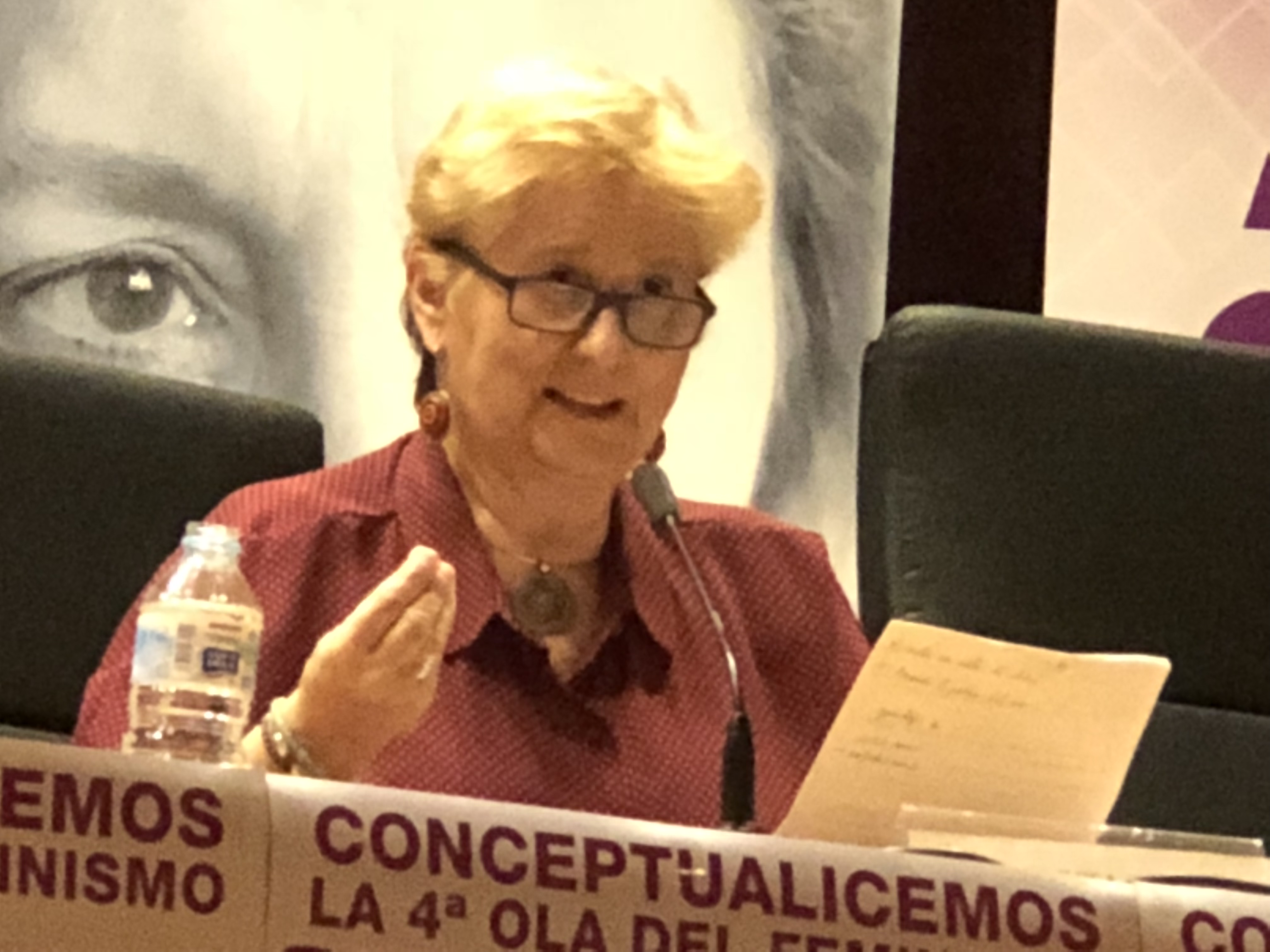 Feminario 2018